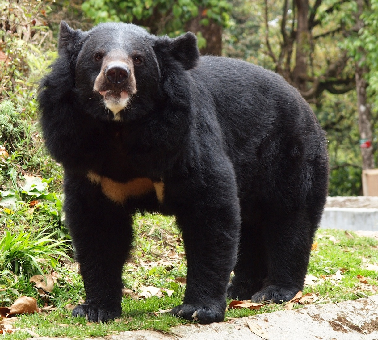 Moon bear at the Darjeeling zoo